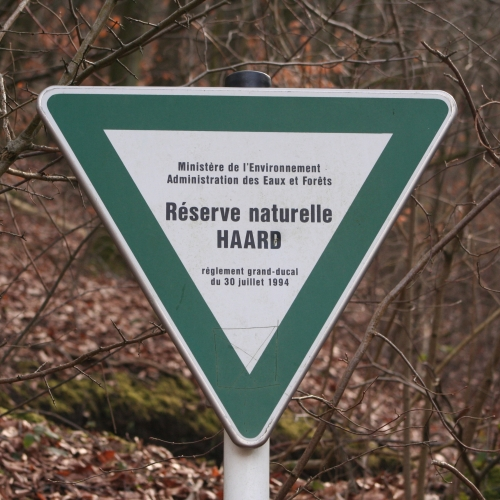 Naturschutzgebietsschild in Luxemburg